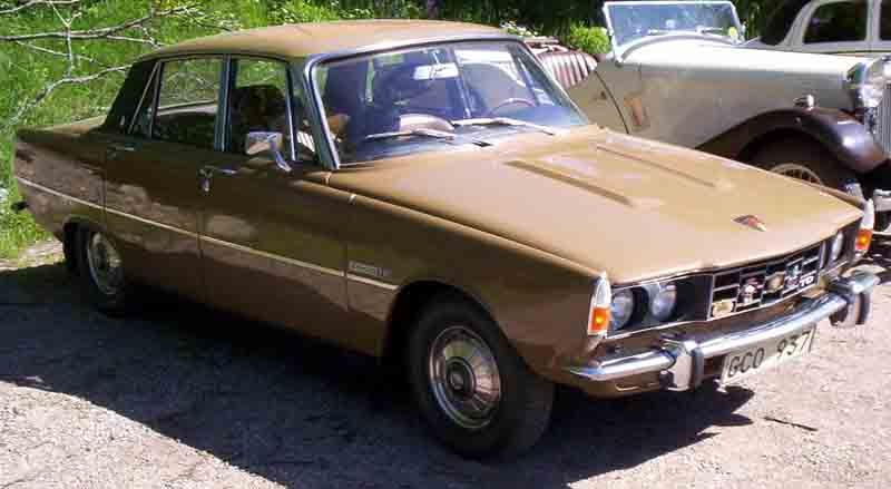 Rover 2000 TC 4-Door Saloon 1973